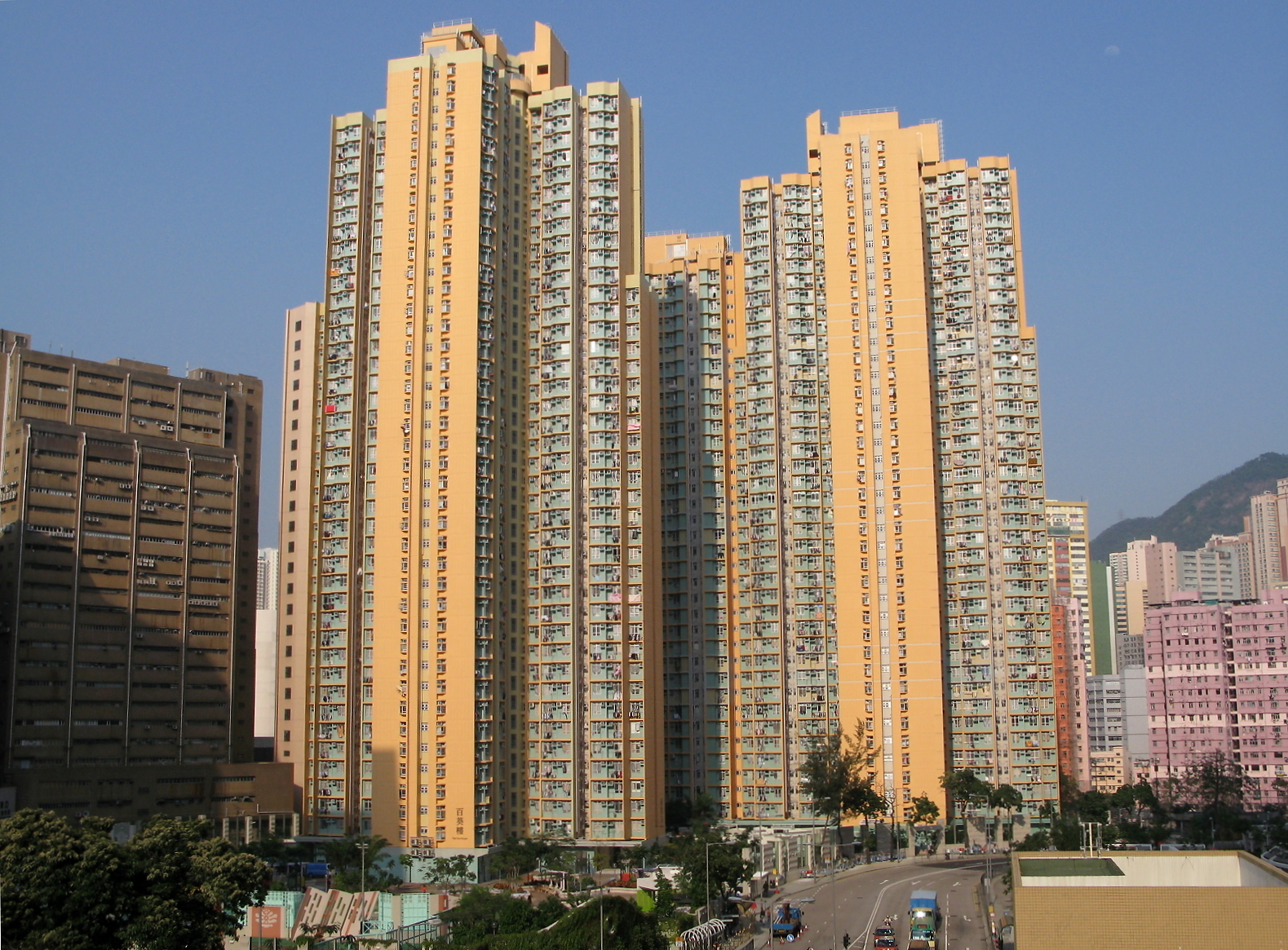 Kwai Chung Estate Phase